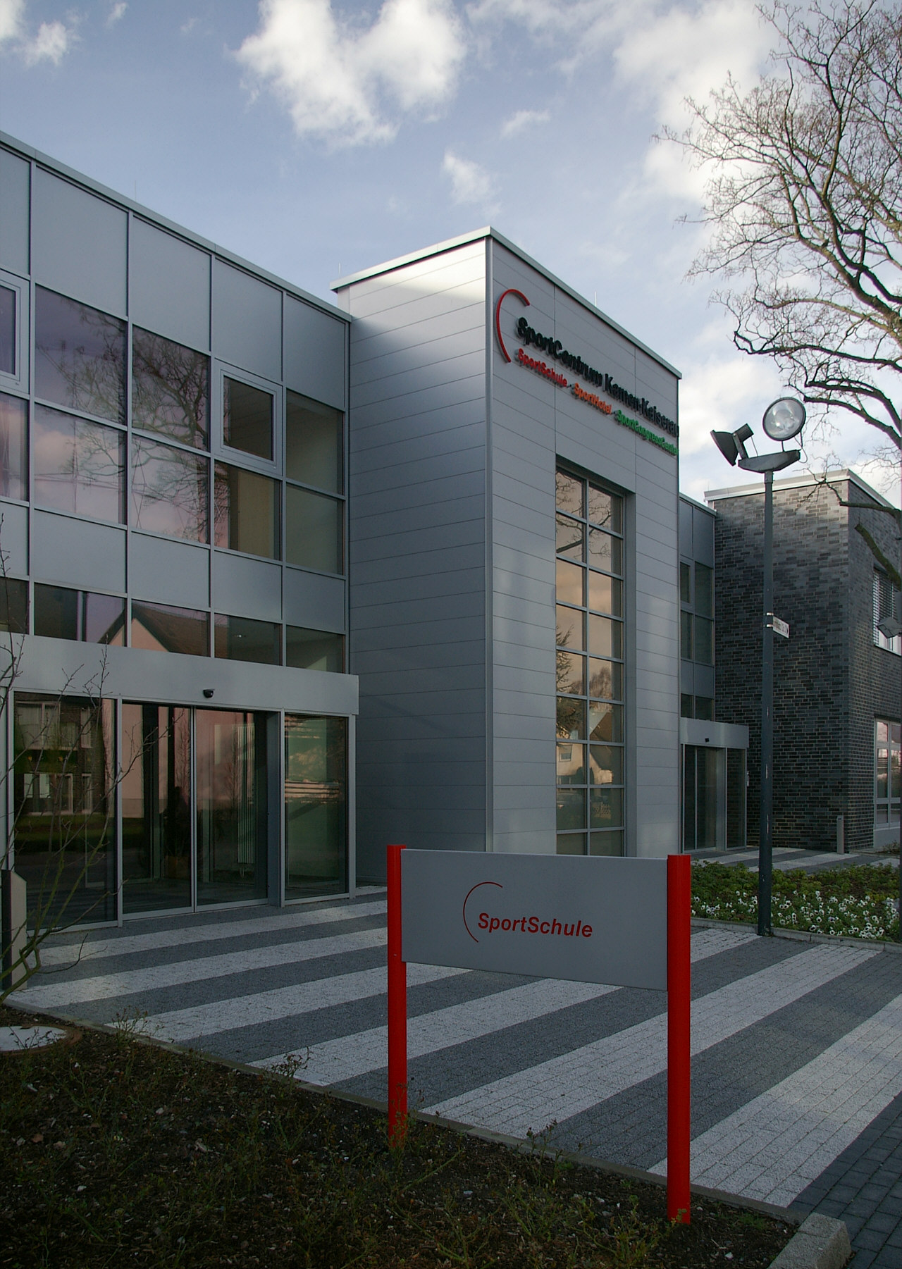 SportCentrum Kaiserau des Fußball- und Leichtathletikverbandes Westfalen e.V., Eingang Sportschule